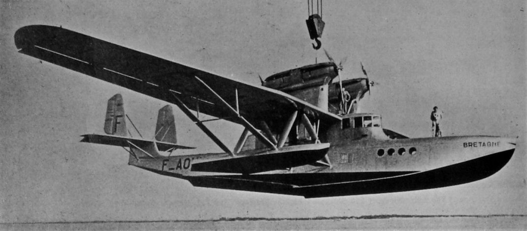 Das französische Flugboot Loir2 102